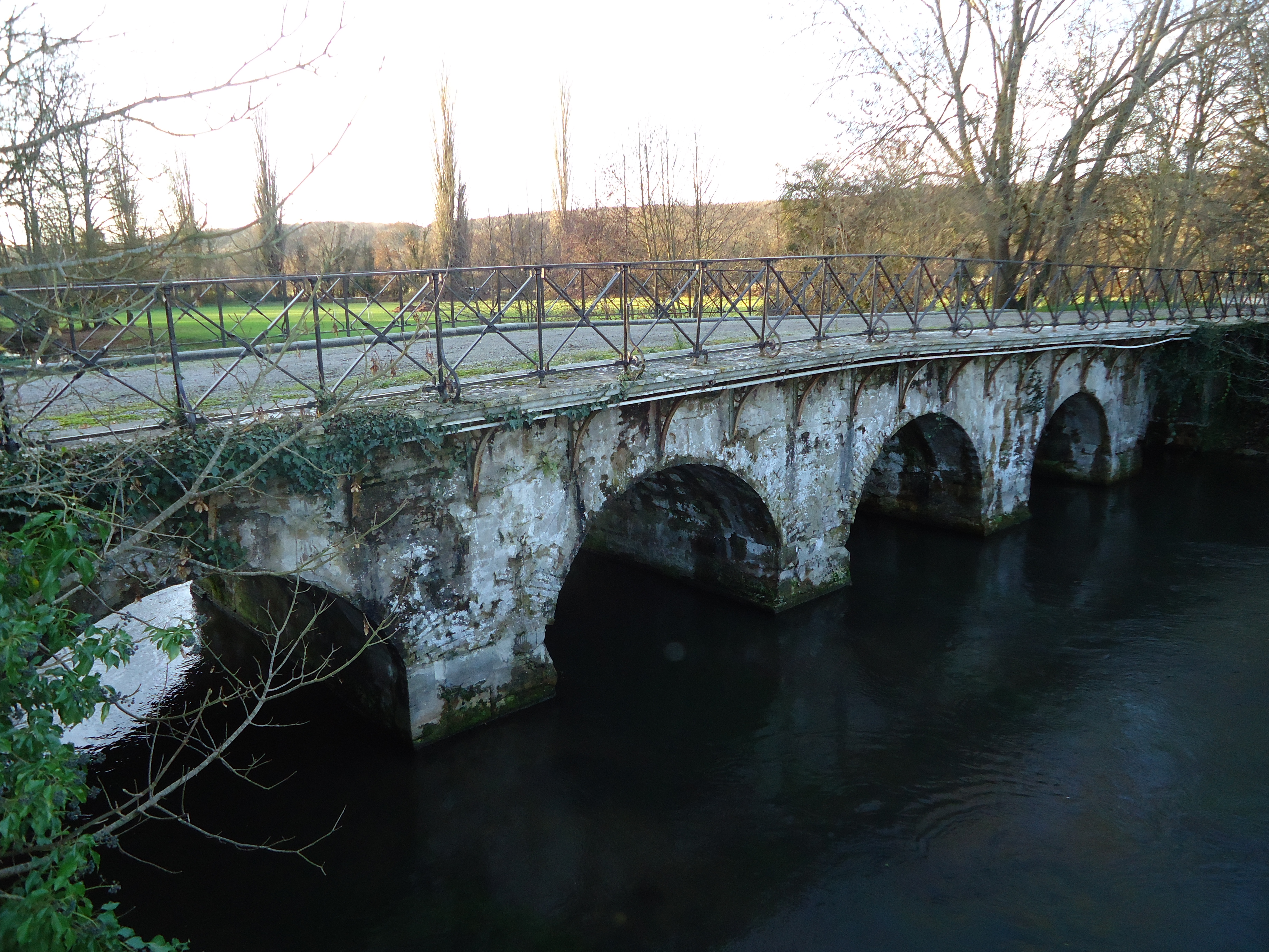 Acquigny - Le pont des Planches (XVIIIe & XIXe) sur l'Iton - Vue aval.